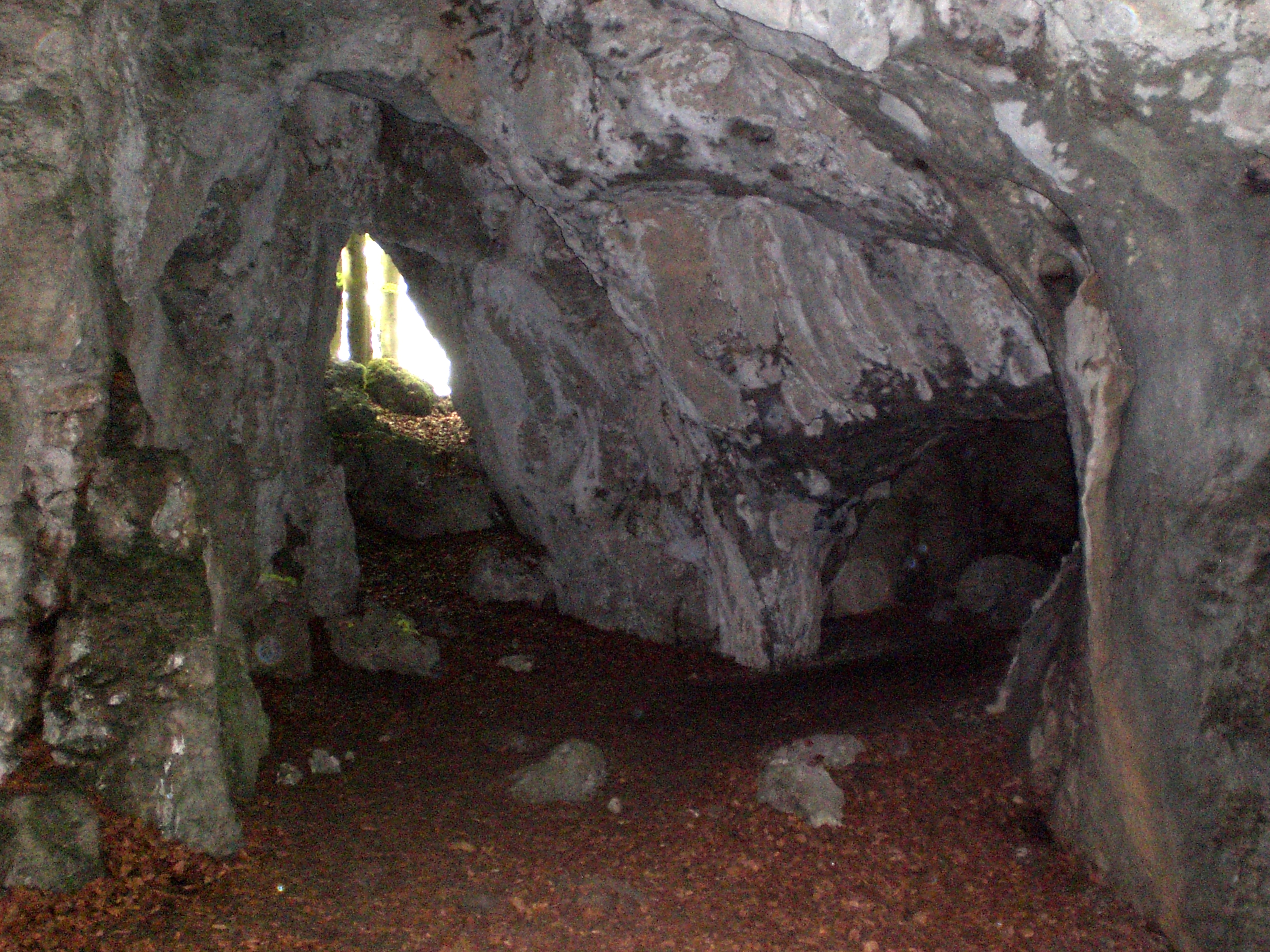 Esperhöhle